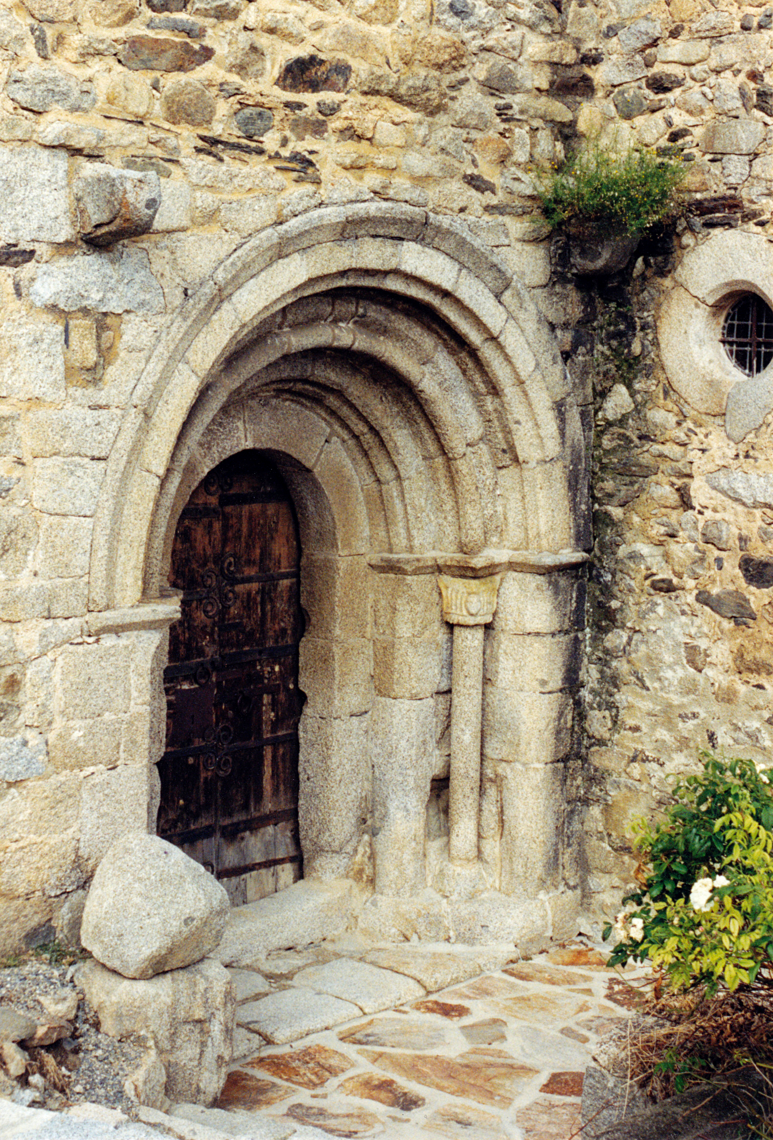 France - Cerdagne - Église Saint-André d'Angoustrine